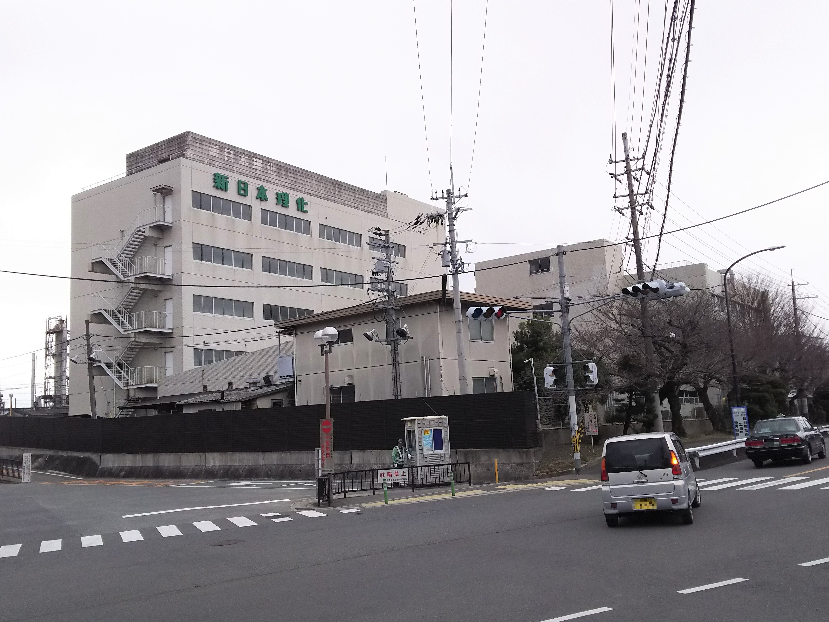 新日本理化研究所（京都市伏見区）